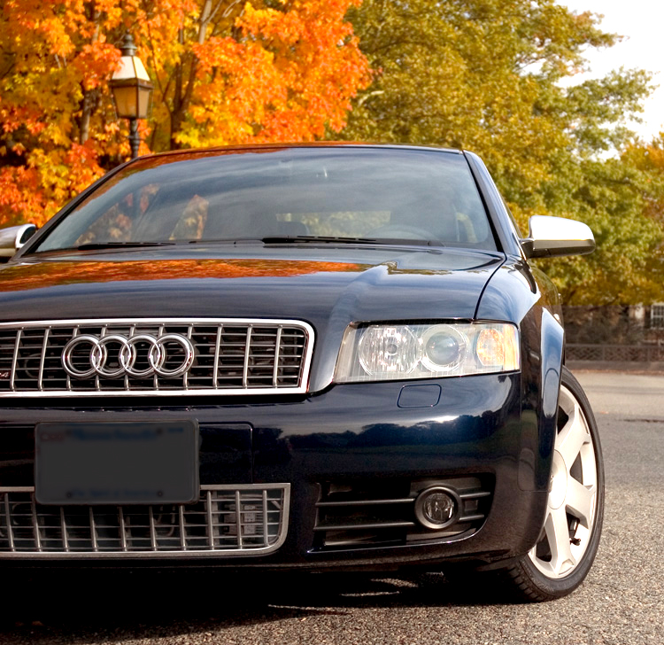 A 2005 Audi S4